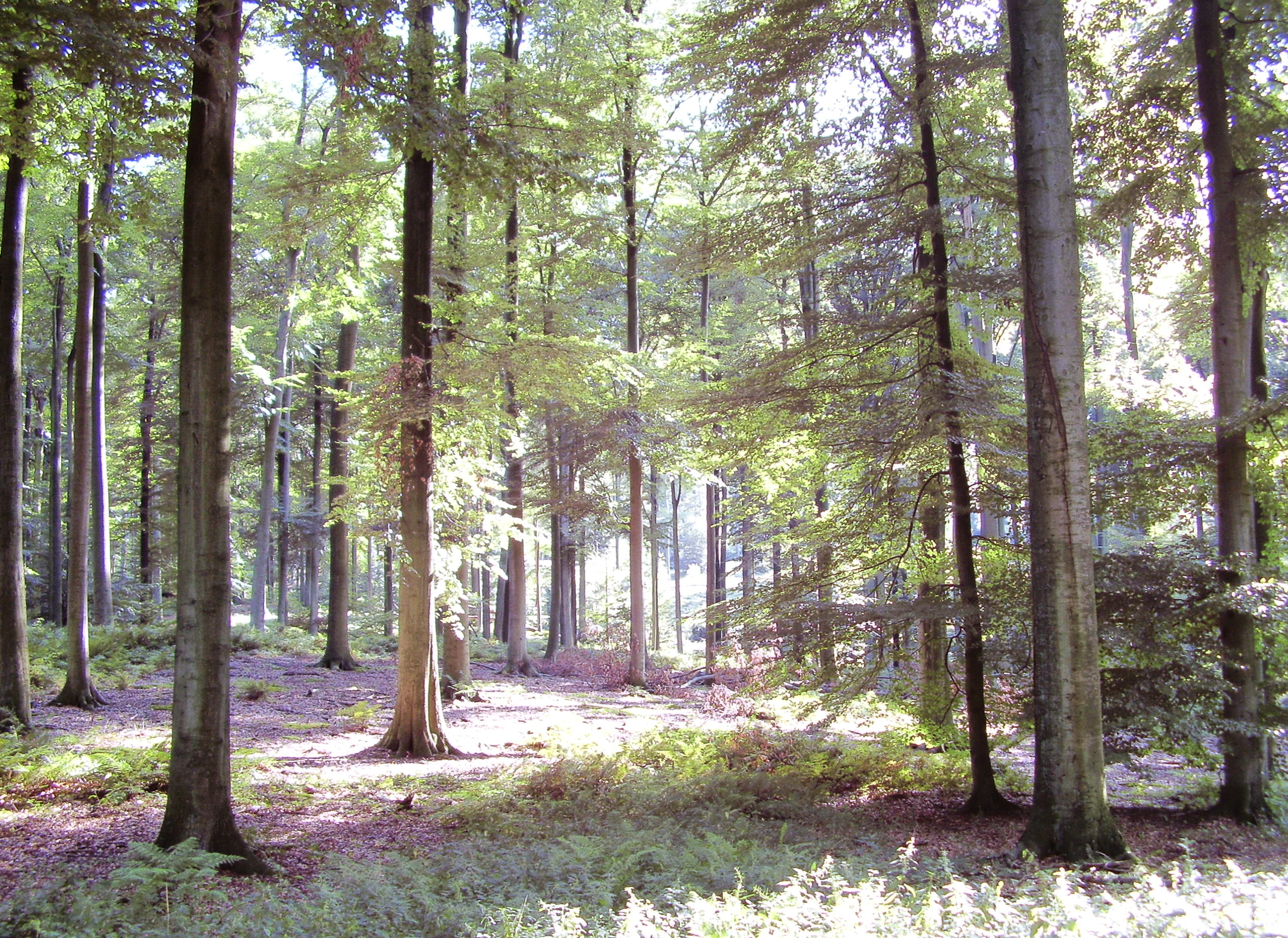 Description: Forêt de Soignes (Bruxelles). Hêtraie caractéristique des forêts tempérées d'arbres à feuilles caduques de l'Europe. Author: User:Ben2 Date of creation: 29 août 2006 Source: Photo personnelle